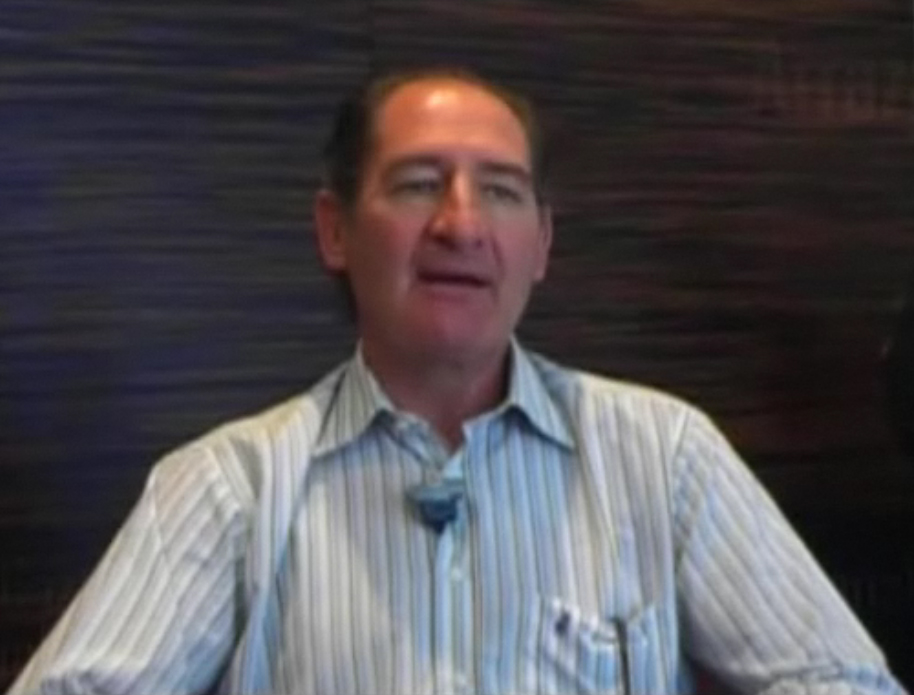 Brian Currin 2010ean.